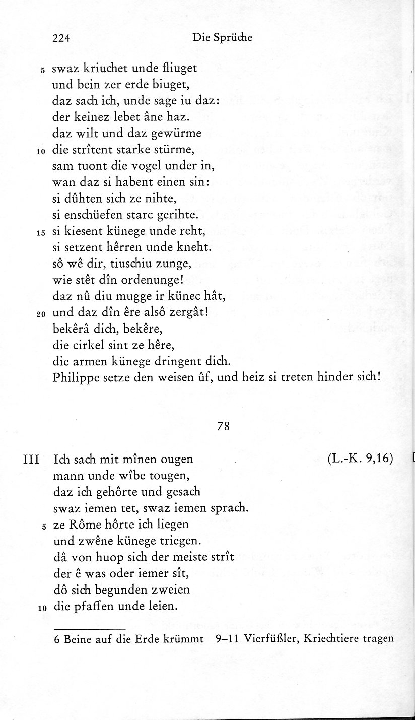 Reichston_2